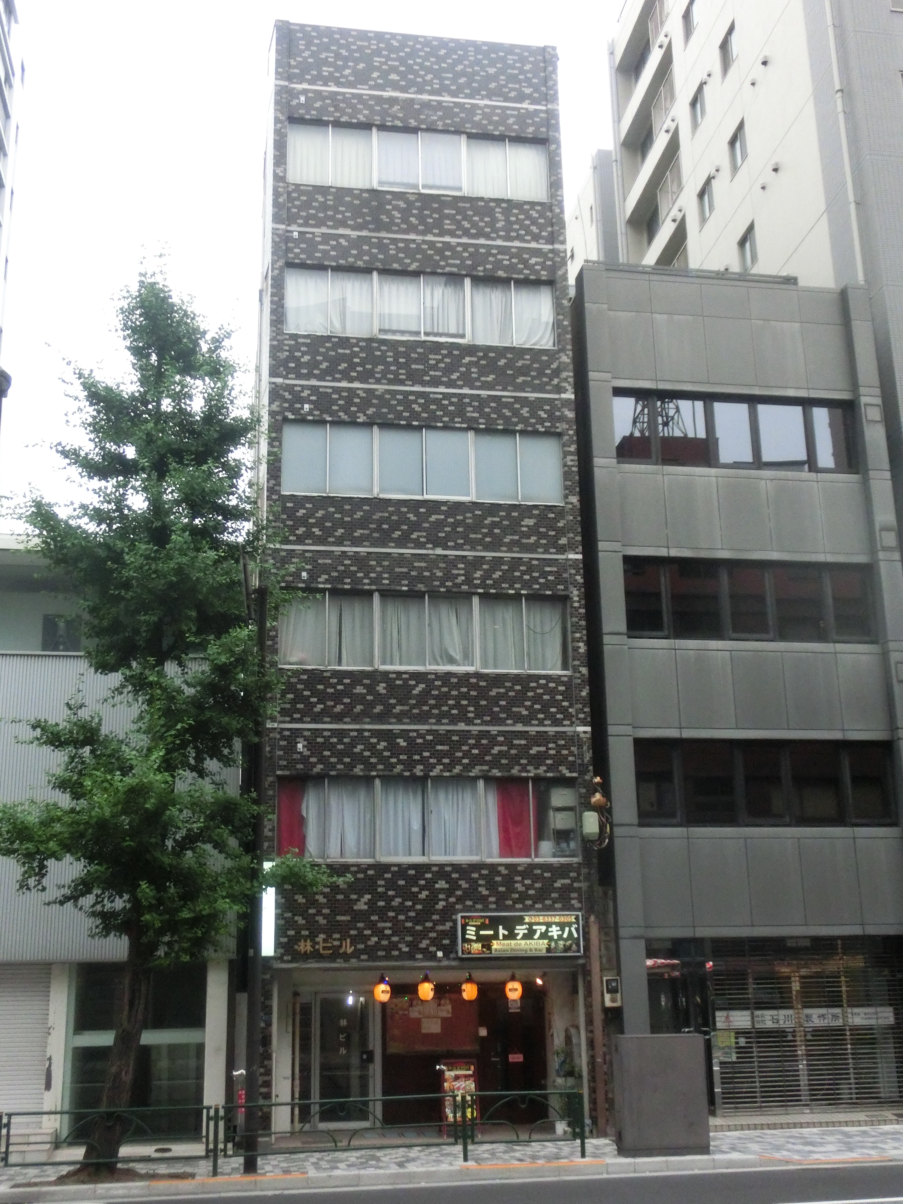 秋葉原・林ビル